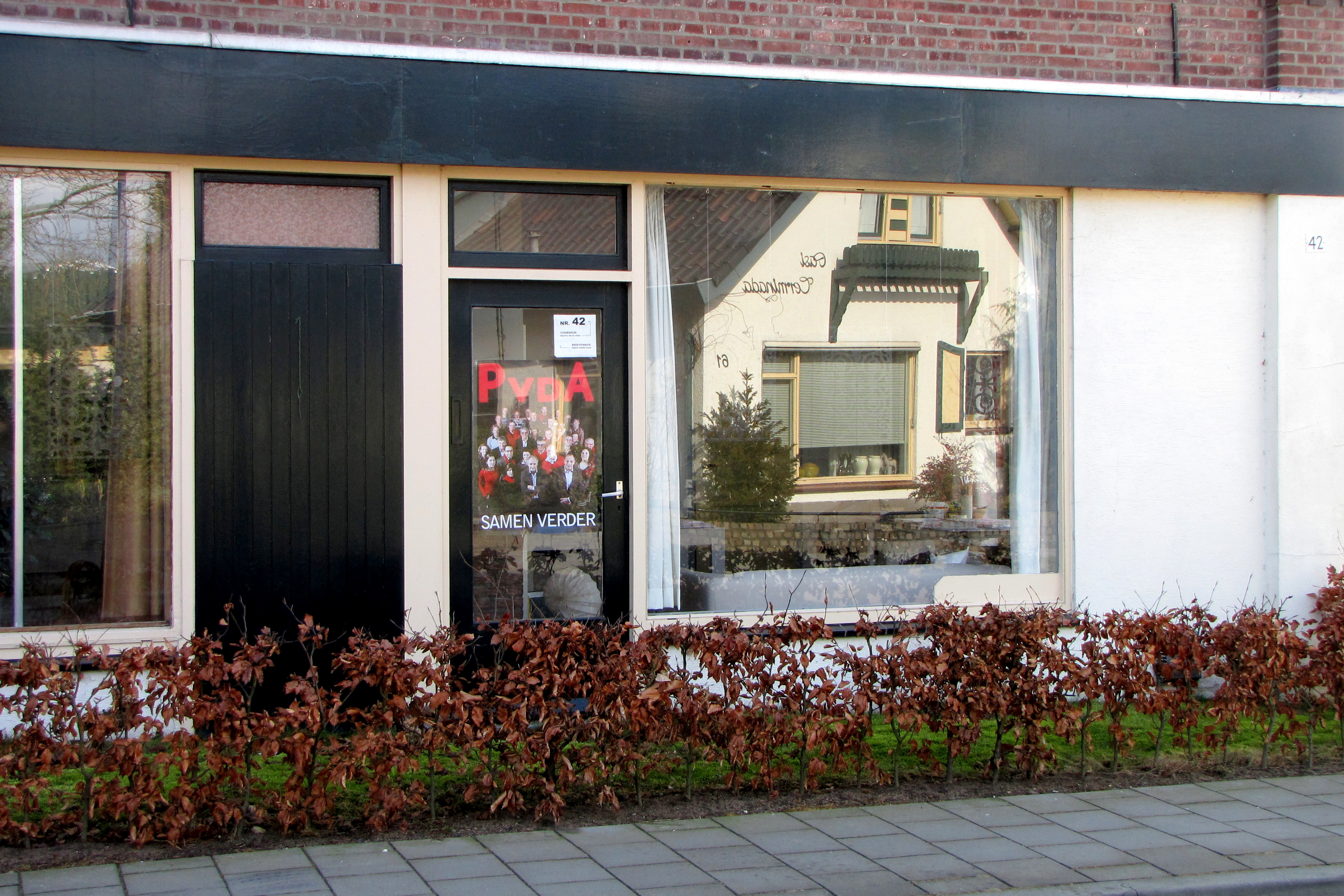 Pvda-verkiezingsposter, gemeenteraadsverkiezingen maart 2010. Silvolde (Oude IJsselstreek).